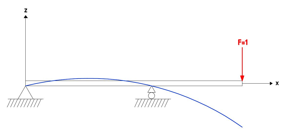 segédlet a Betti-tétel szócikkhez